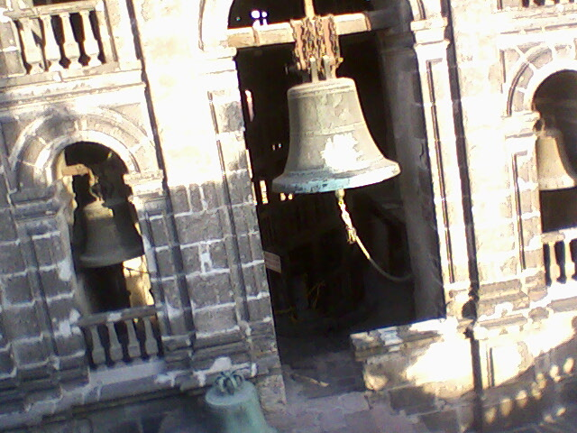 parte del campanario de la catedral de mexico